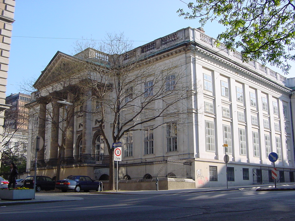 Palays Rasumofsky